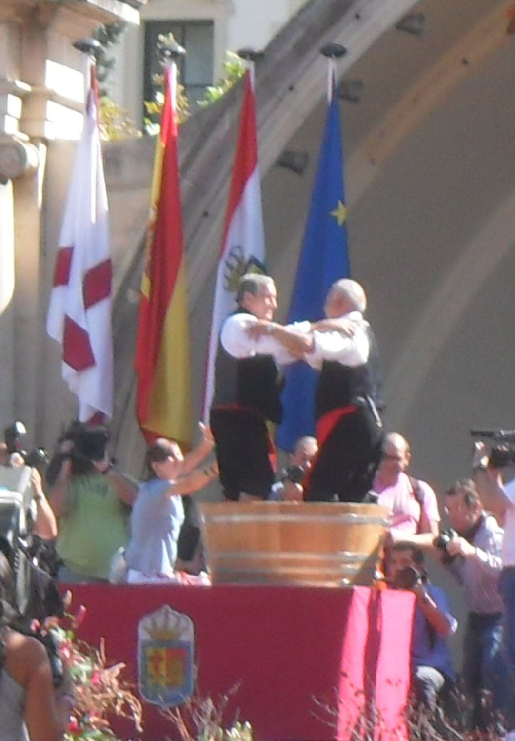 El Pisado de la Uva, acto central de las Fiestas de San Mateo de Logroño (España)